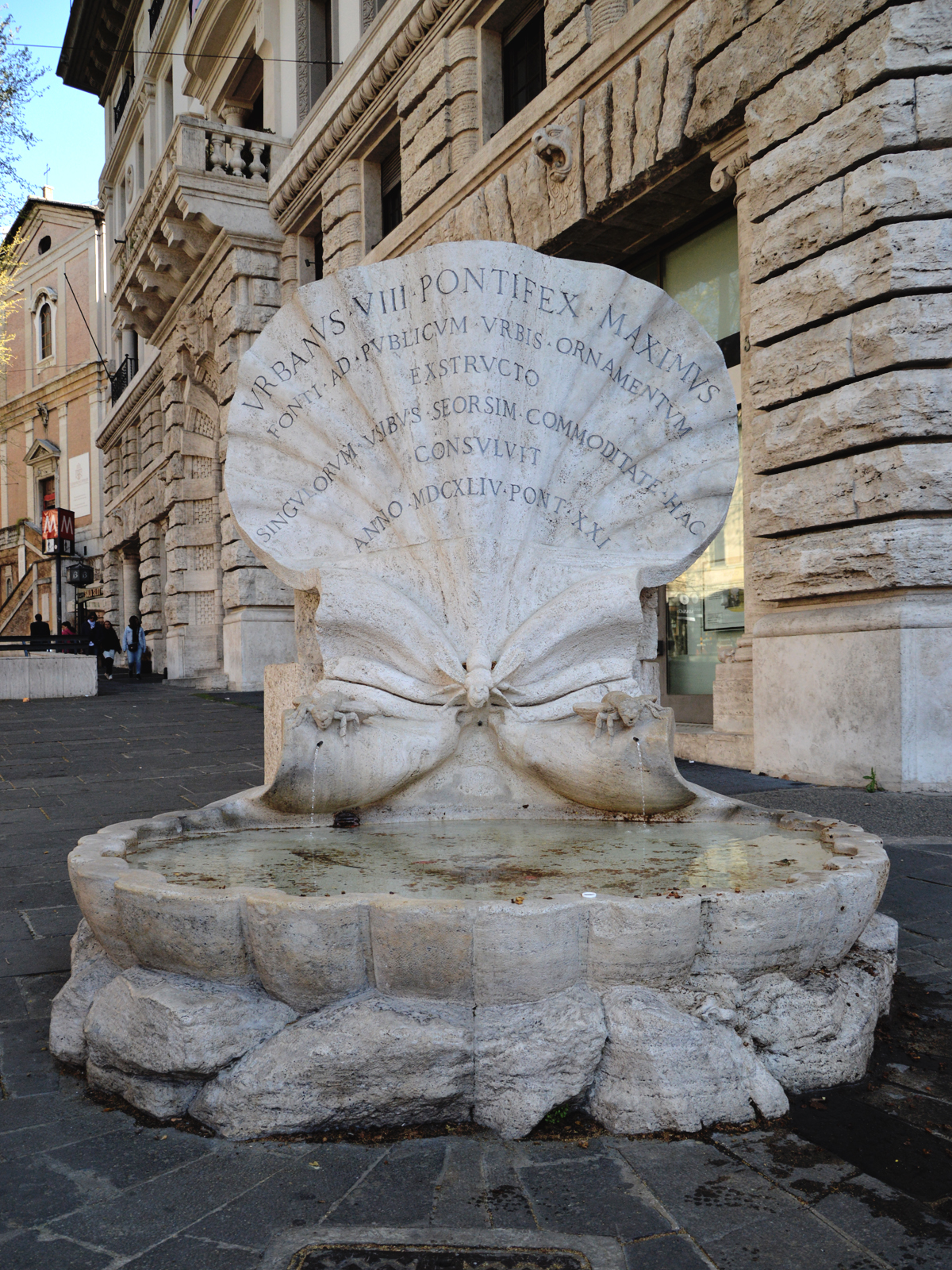 Fontana delle Api This is a photo of a monument which is part of cultural heritage of Italy.